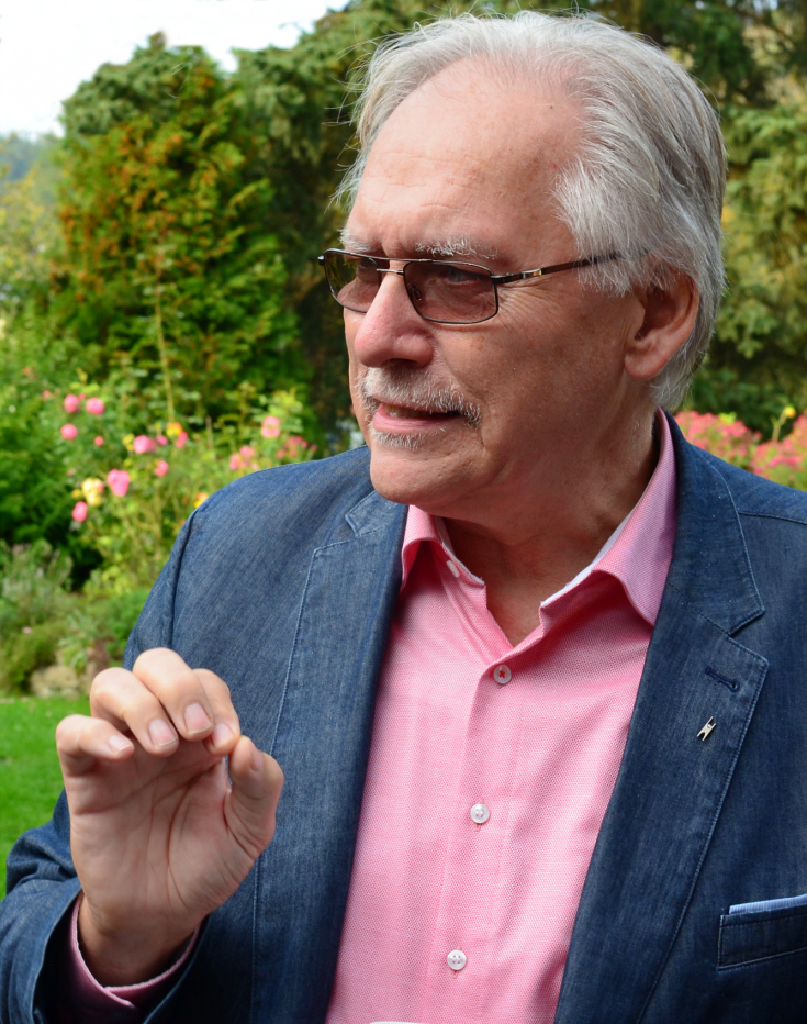 Ralf Nielbock beim Kolloquium zu den Harzhöhlen und ihrem Kulturerbe am 14. Oktober 2016 in Scharzfeld